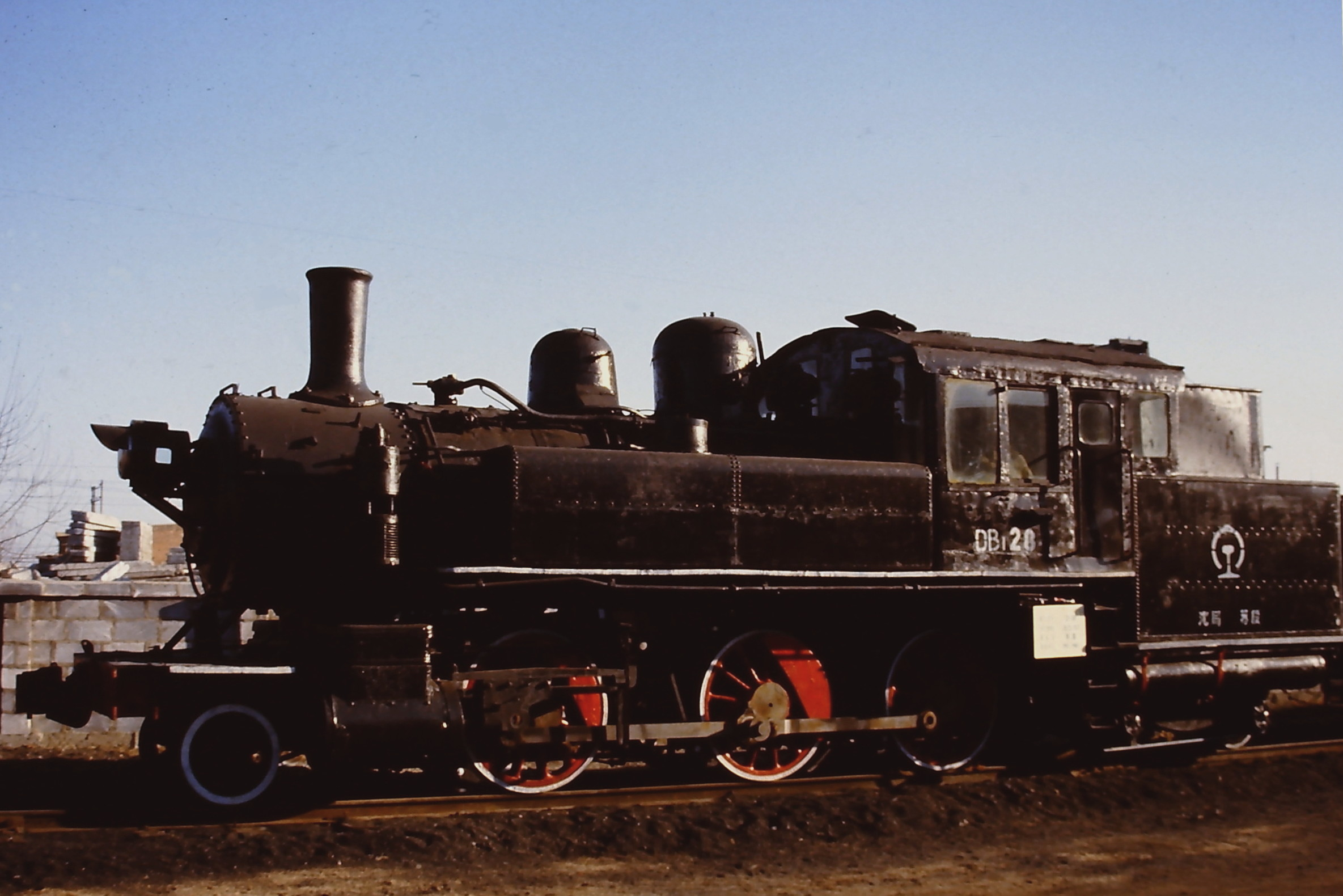 CNR DB1-28 (Dampflokomotivmuseum Shenyang)